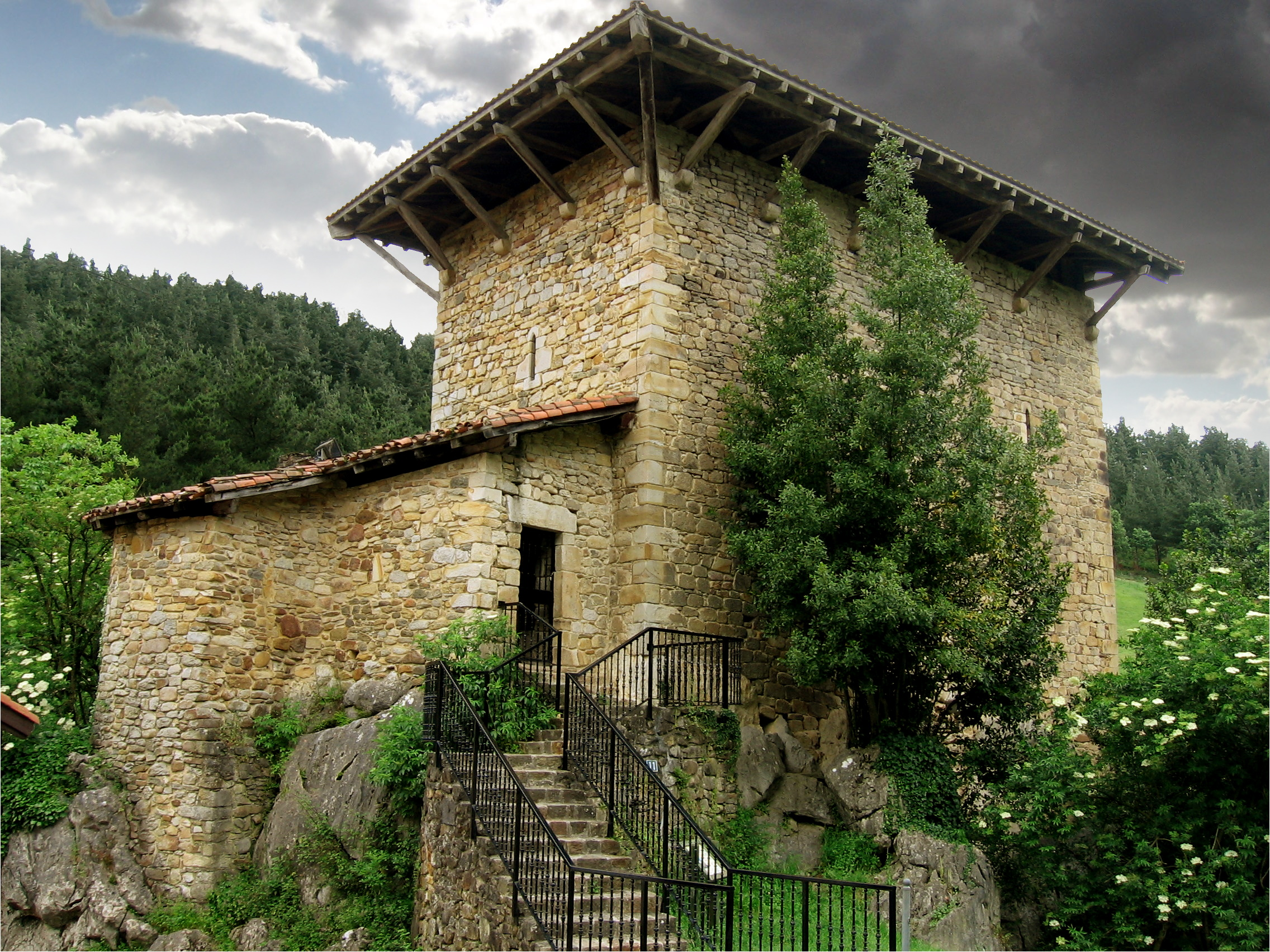 Torre de Etxaburu / Etxaburu dorretxea